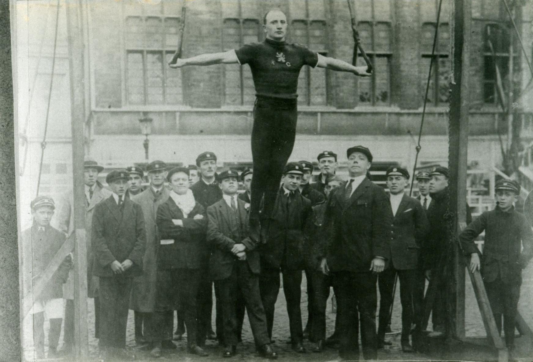 Domien Jacob, Belgian Gymnast